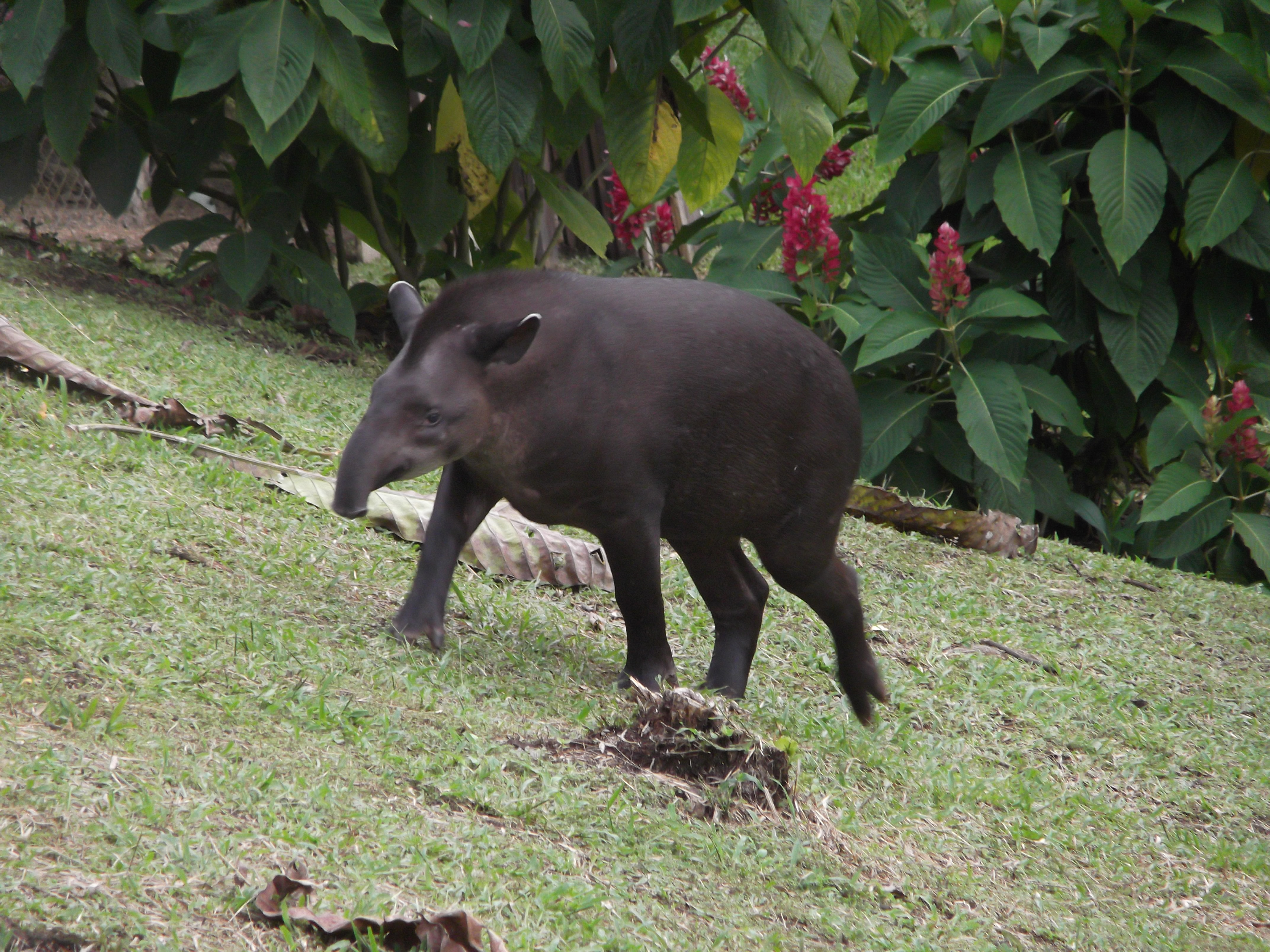 En la Selva Ecuatoriana, los animales conviven con los nativos..